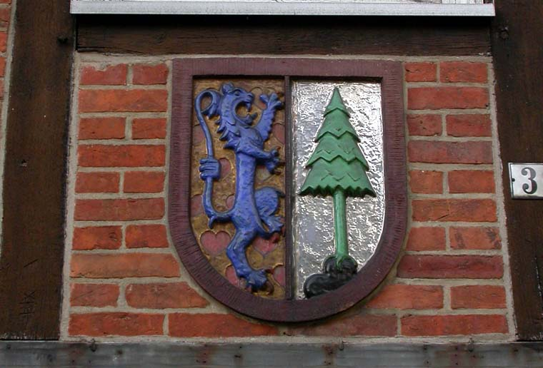 Beschreibung: Das Wappen des ehemaligen Landkreises Dannenberg an einem Nebengebäude des Amtsgerichts Dannenberg (Elbe) neben dem Waldemarturm. Rechts (sic) der Lüneburger Löwe vor einem goldenen Feld mit roten Herzen, links die Dannenberger Tanne. Quelle: Eigene Aufnahme vom 3. 9. 2005 Fotograf: Heiko Selber